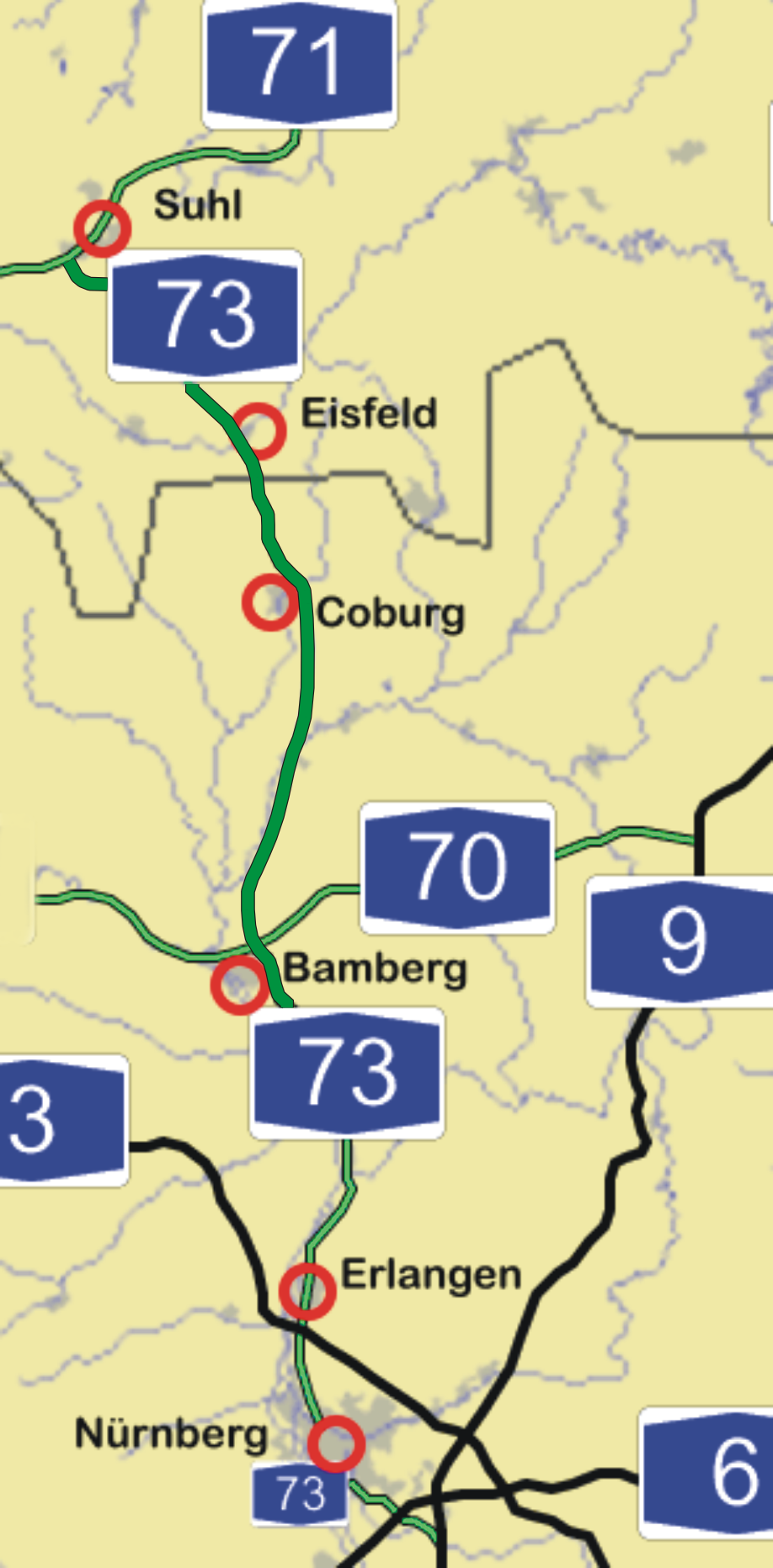 German Autobahn A73